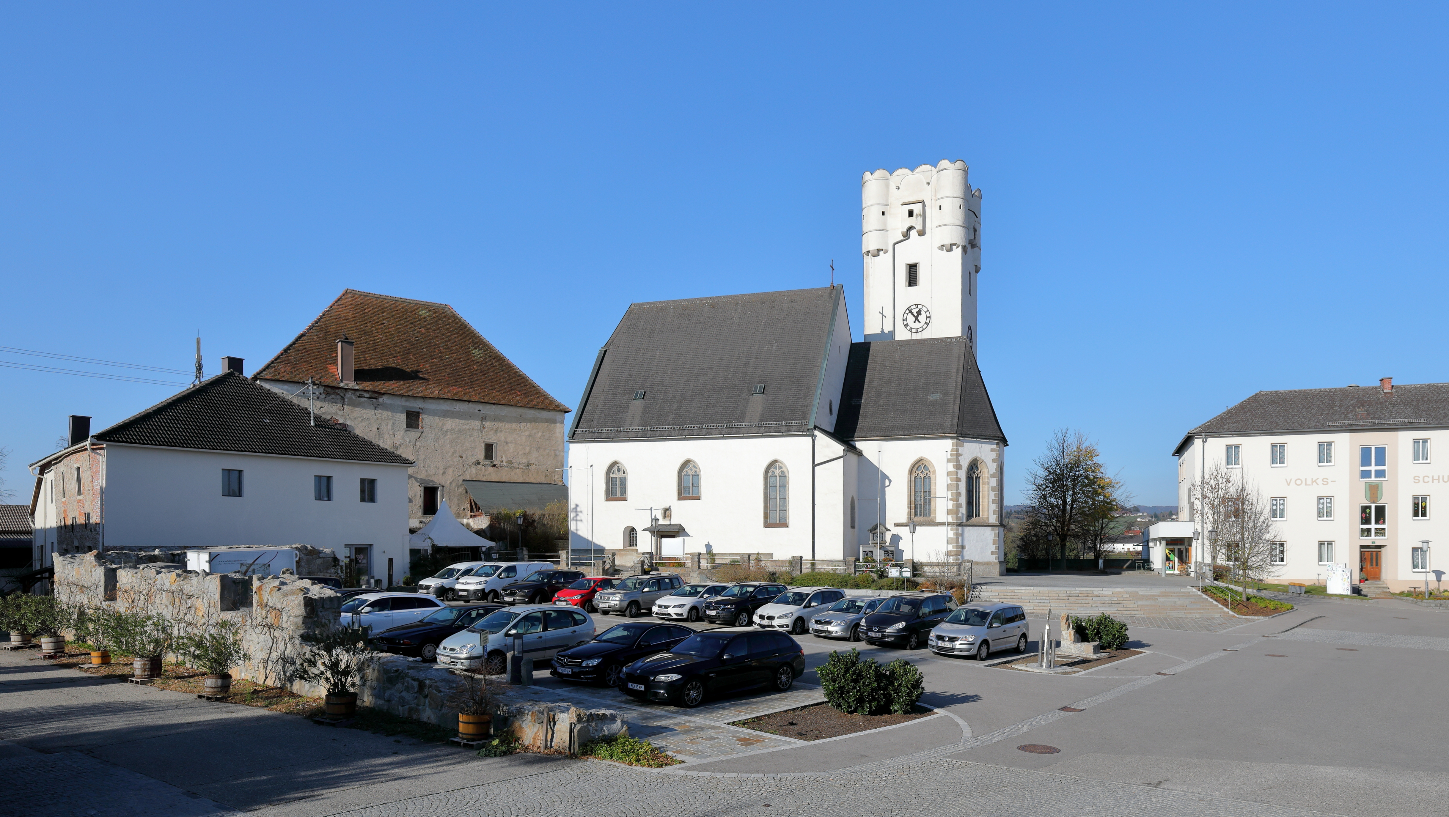 Der Schlossberg bzw. das Ortszentrum der oberösterreichischen Gemeinde Arbing. Links das Schloss, in der Mitte die röm.-kath. Pfarrkirche mit dem markanten Kirchturm, der ursprünglich ein Wehrturm war, und rechts die Volksschule.